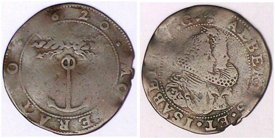 Voorbeeld van een zwaar gesleten jeton, waarschijnlijk geslagen in Brussel op het terugzenden van gevangenen door Spinola in 1620. Foto van eigen exemplaar.